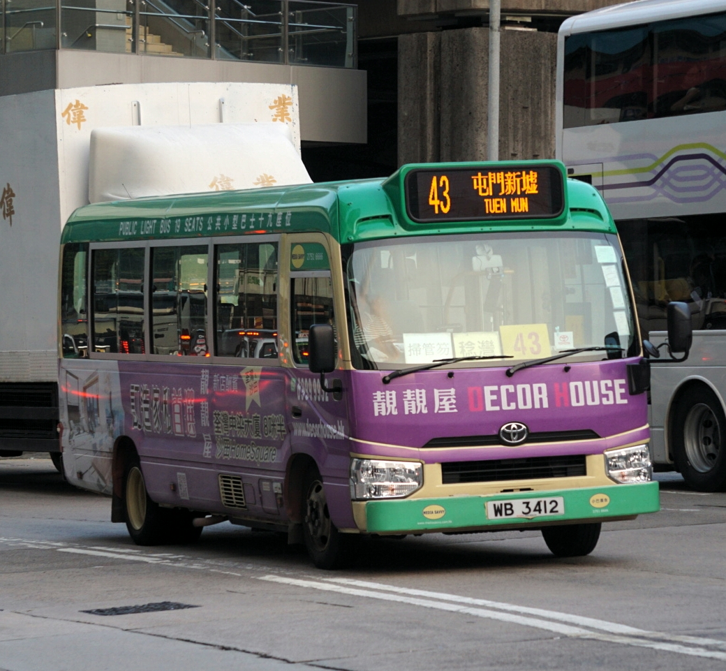 中文（香港）: 新界區專線小巴43線，正準備駛入屯門站